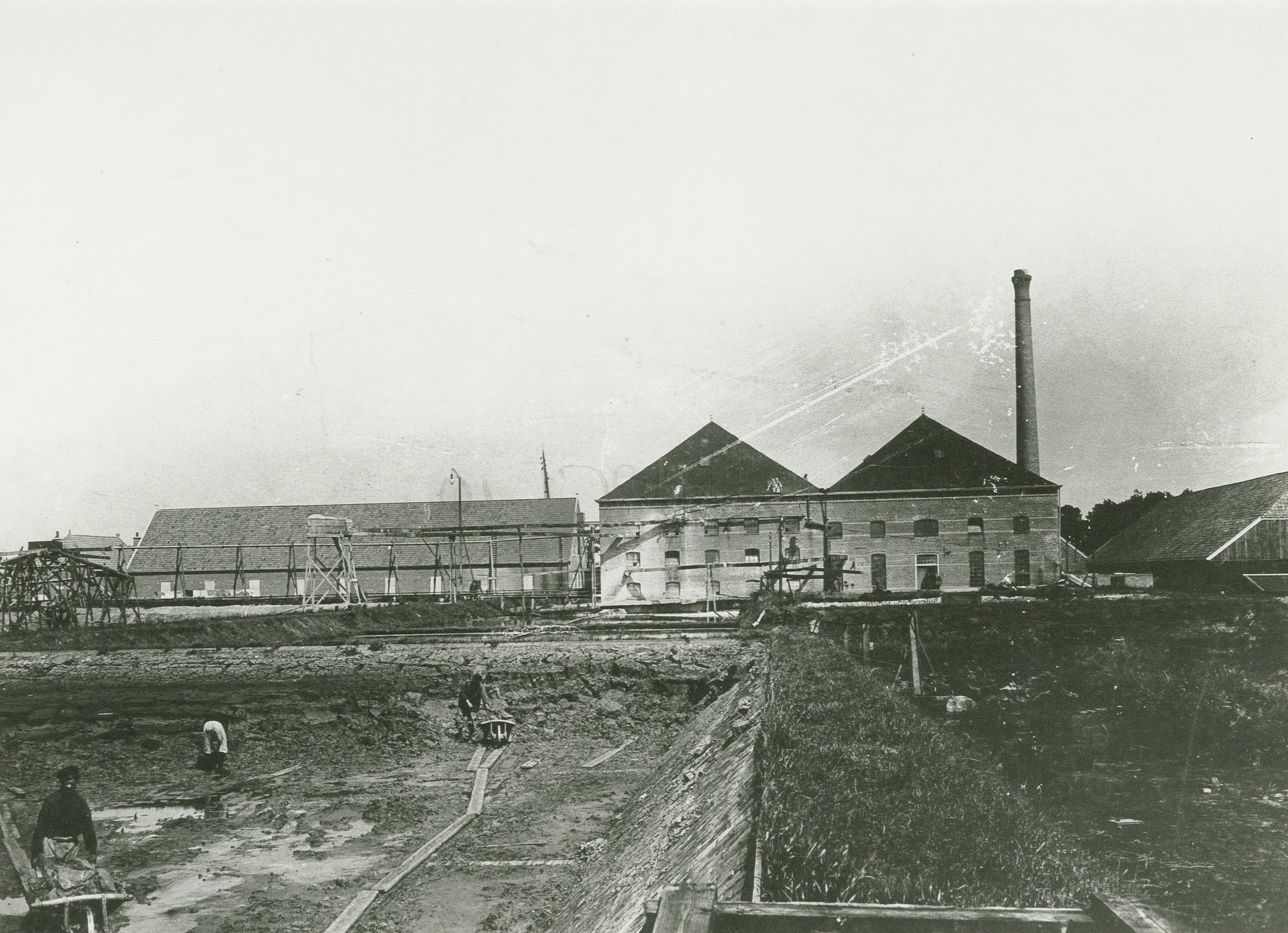 Achterzijde van de Coöp. aardappelmeelfabriek "Oostermoer"